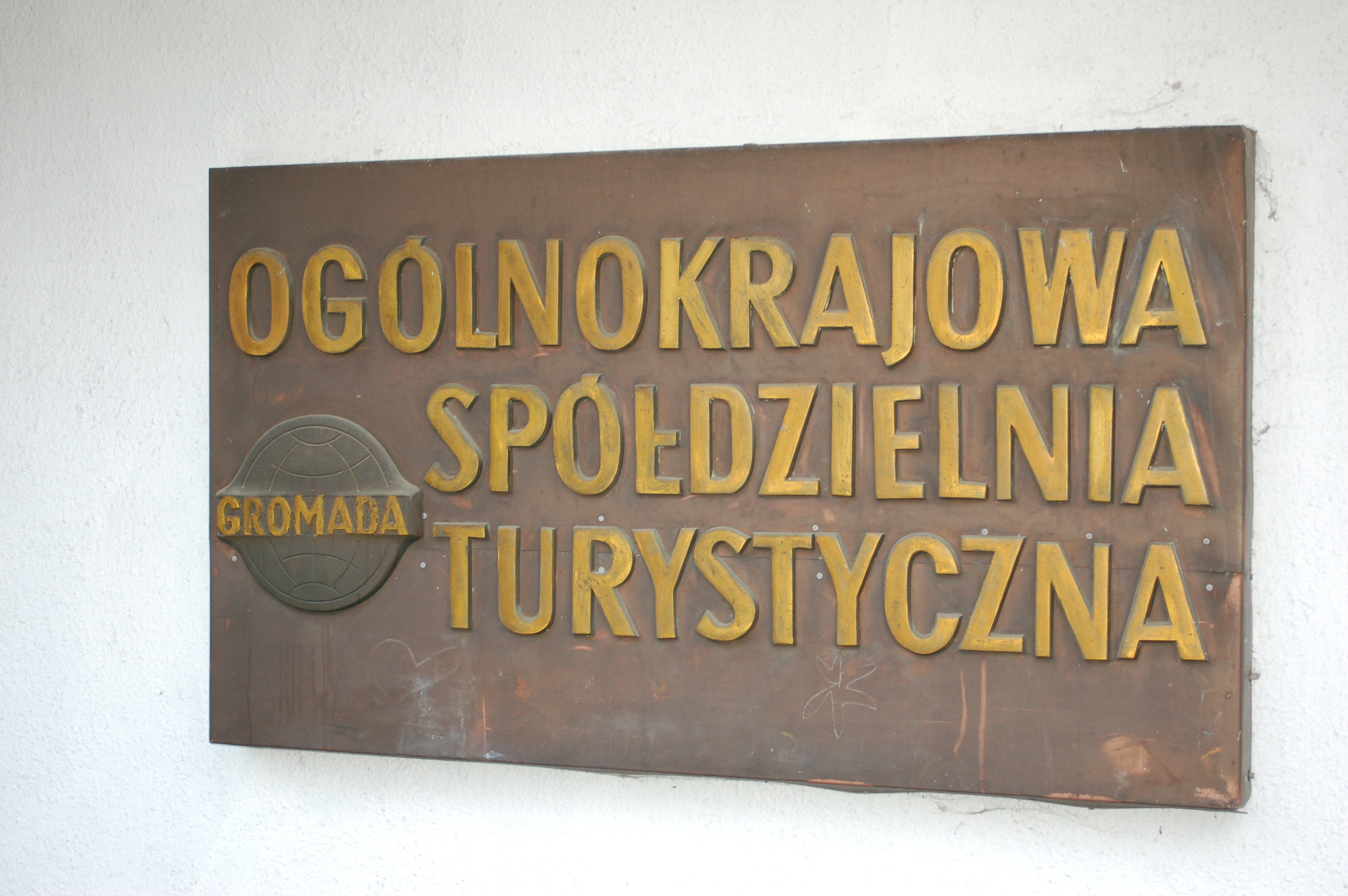 Gromada headquarters, Warsaw